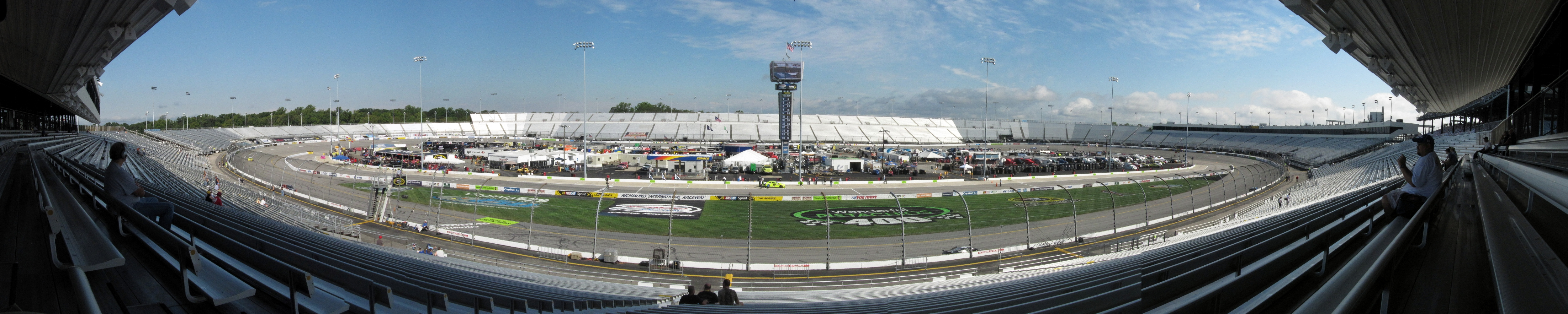 Panorama von der Haupttribüne im September 2011 vom Richmond International Raceway.